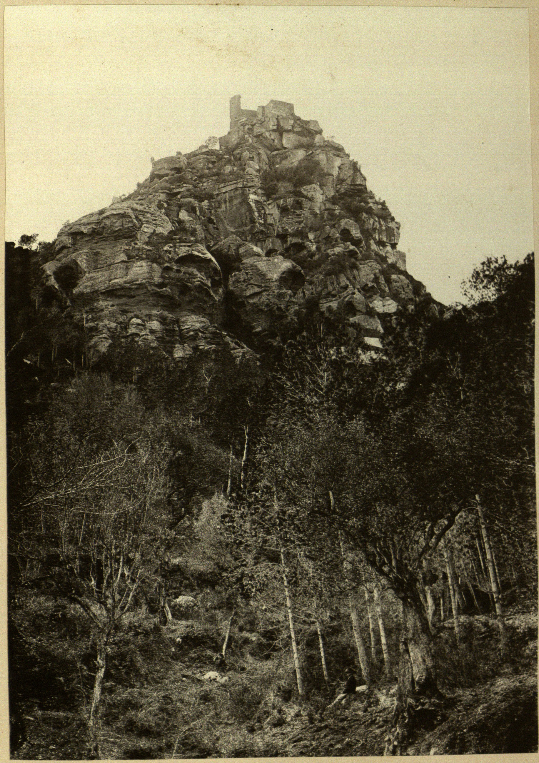 'Castell d'Eramprunyà', fotografia d'Heribert Mariezcurrena (~1878). Estampa núm. 18, acompanyada de text explicatiu, a l'Album Pintoresch-Monumental de Catalunya: aplech de vistas dels més notables monuments i paisatjes d'aquesta terra acompanyadas de descripcions y noticias históricas y de guias pera que sían fácilment visitats, publicat per l'Associació Catalanista d'Excursions Científiques el 1878. De disposició lliure al dipòsit digital de documents de la UAB.